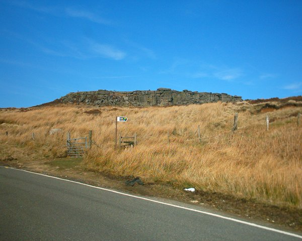 Higger Tor, Sheffield.